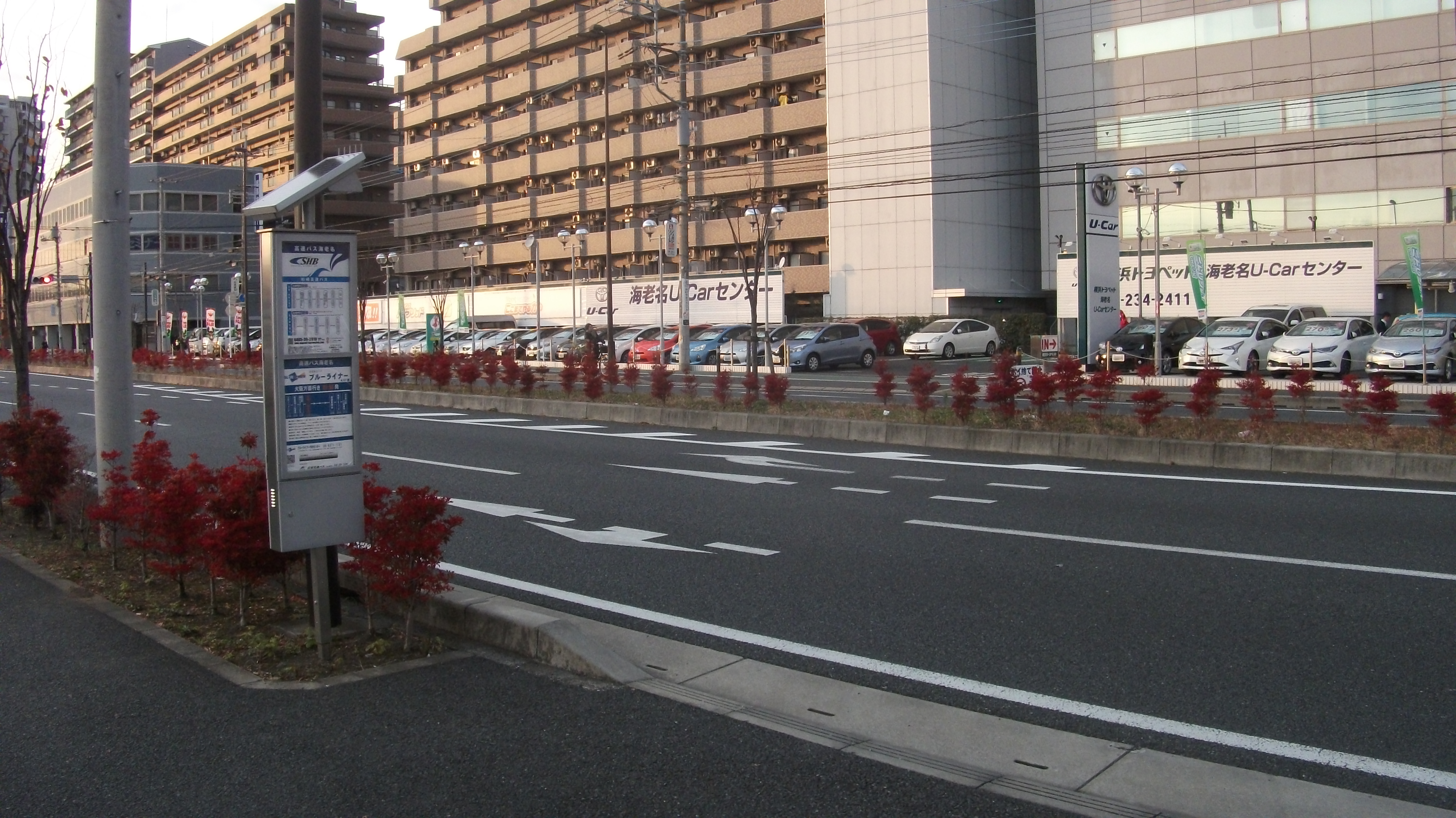 「高速バス海老名」バス停。